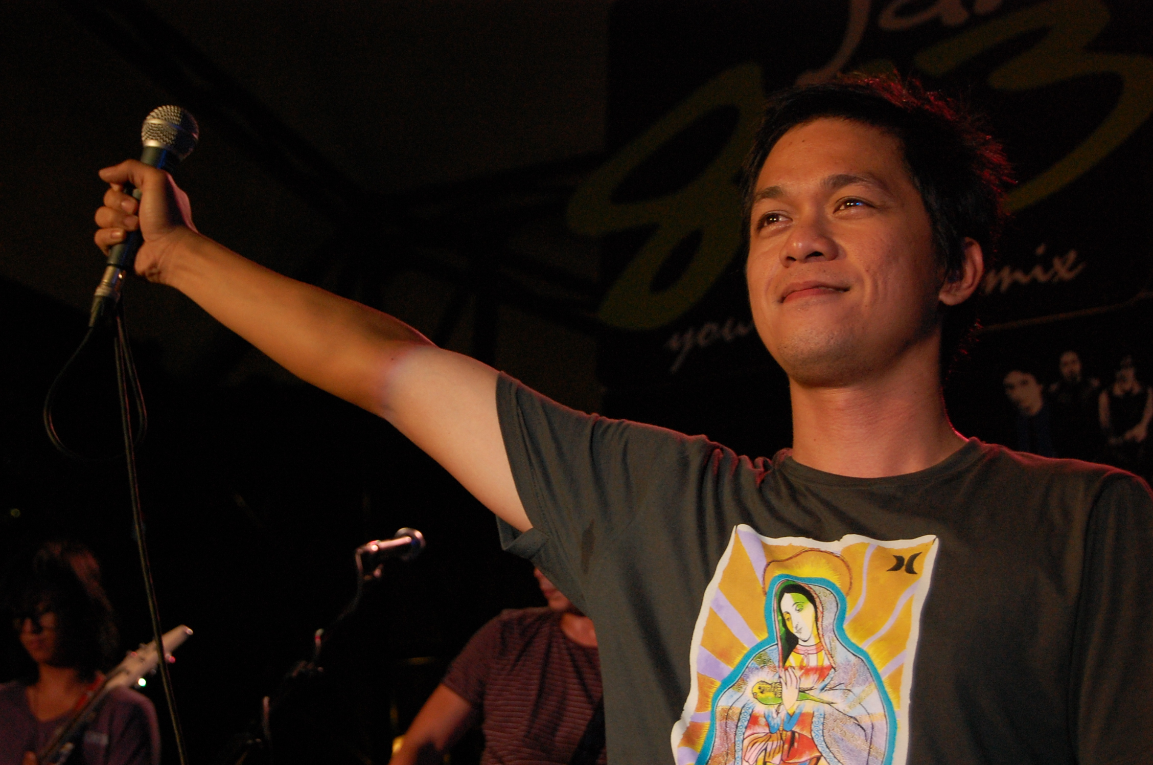 Filipino musician Raimund Marasigan